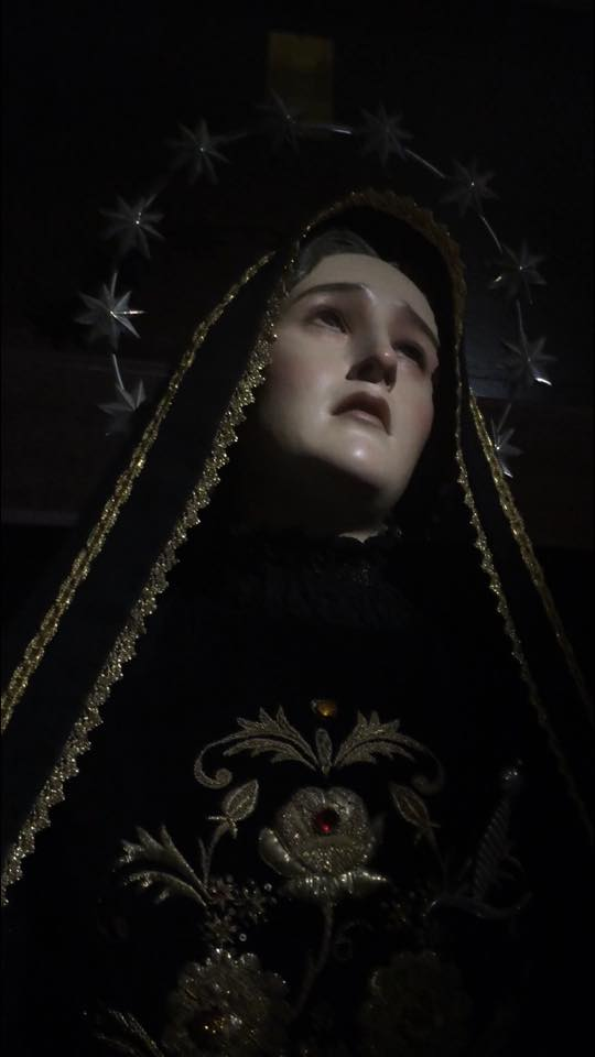 Addolorata di Pasquale Mancini